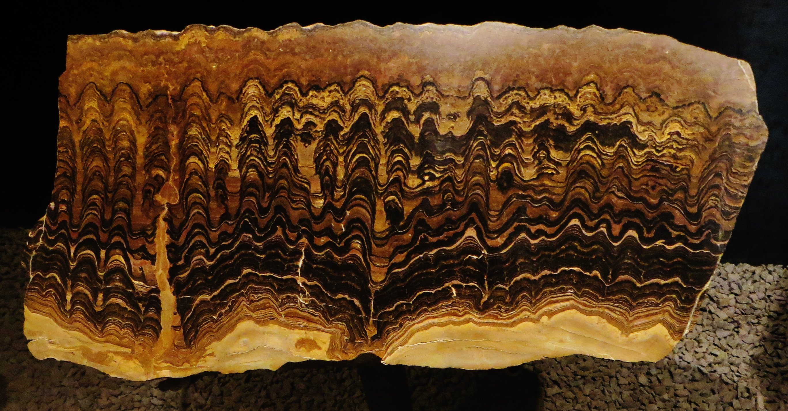 Fossil of Greysonia- Museo di Storia Naturale di Milano